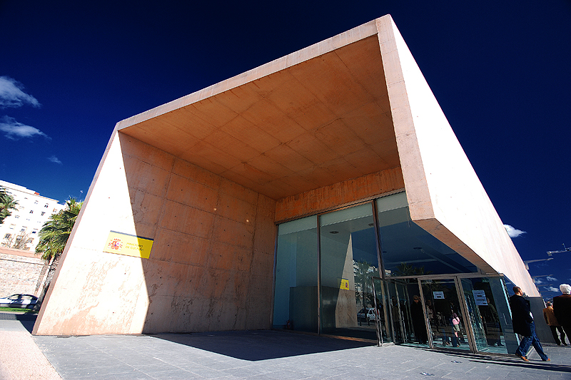 ARQVA. Museo Nacional de Arqueología Subacuática. Cartagena (España)